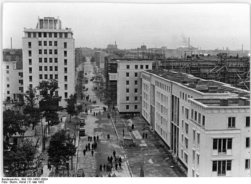 Berlin, Weberwiese, Wohnhochhaus, Wohnblock, Baustelle Zentralbild Sturm 5.5.1952 Nationales Aufbauprogramm Berlin 1952 UBz: Blick auf das Hochhaus und den neuen Wohnblock an der Weberwiese.